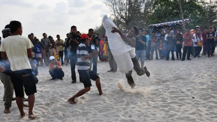 Foto saat lawan berusaha merusak bubu